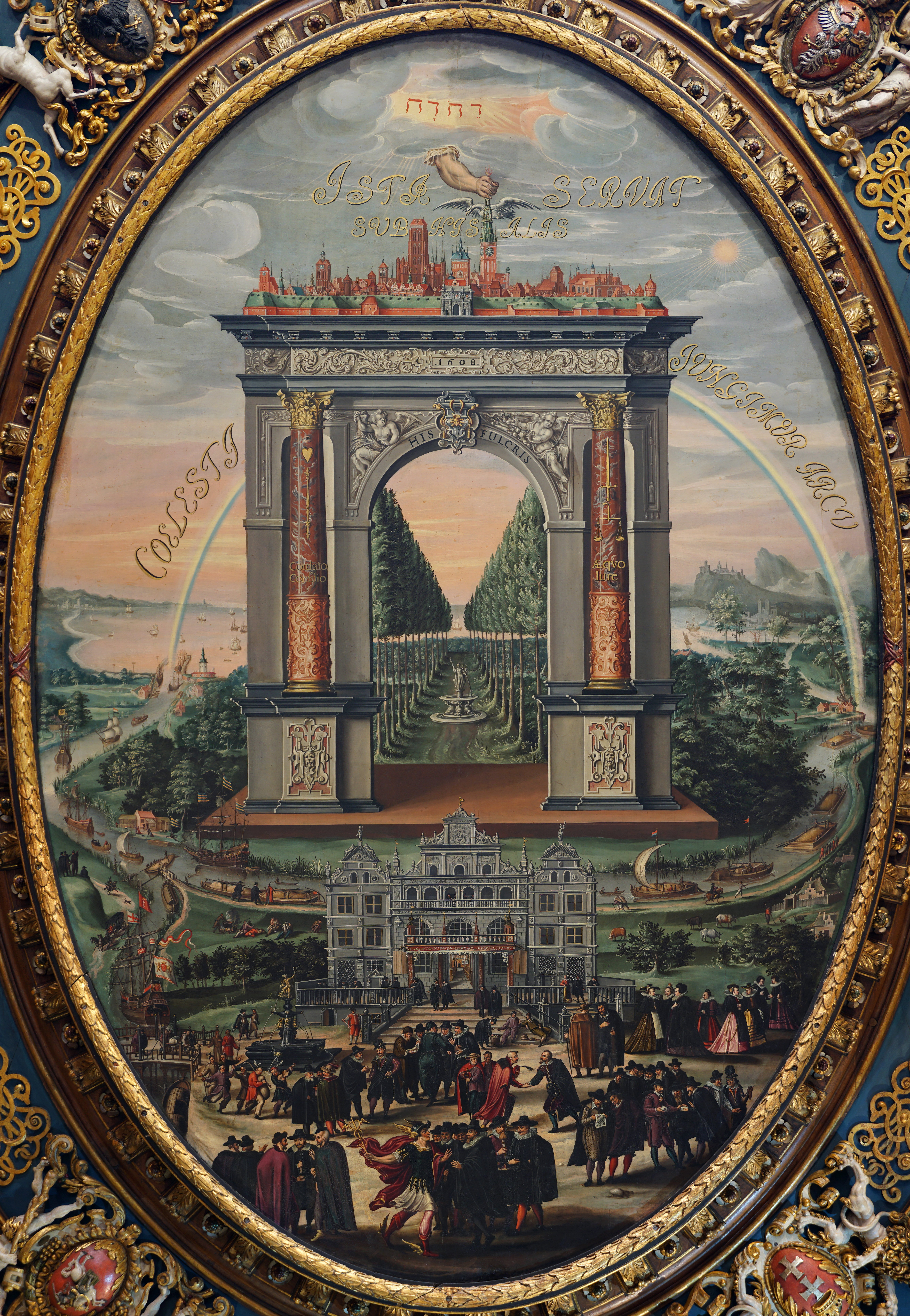 Obraz określany jako "Apoteoza Gdańska", bądź "Alegoria handlu gdańskiego", autor Izaak van den Blocke, 1608, plafon Wielkiej Sali Rady (tzw. Sala Czerwona) w Ratuszu Głównego Miasta w Gdańsku.